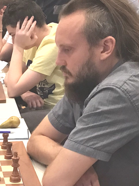 Timur Gareyev, Runde 8 der Grenke Chess Open 2019 in Karlsruhe.